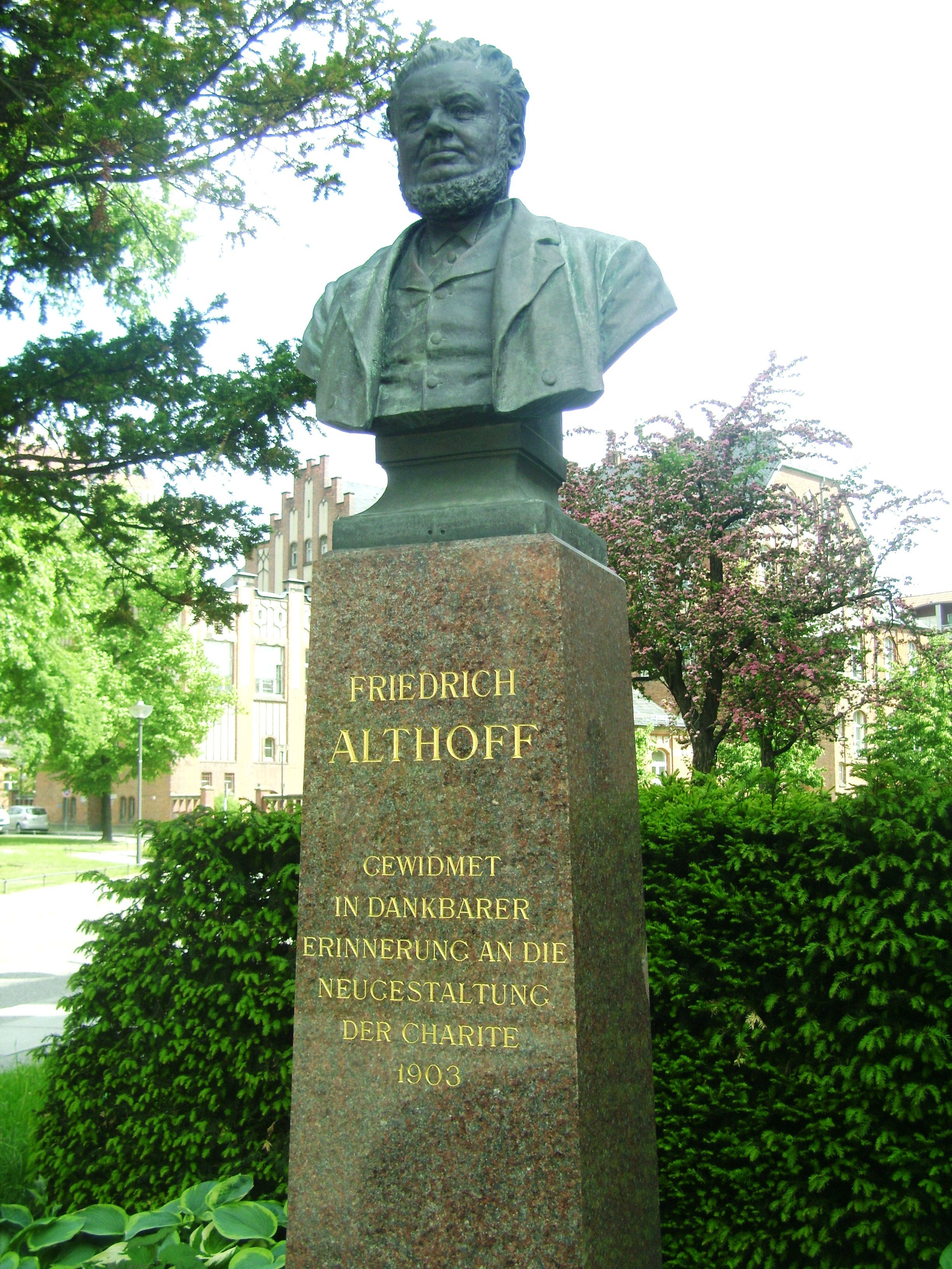 Büste des preußischen Kulturpolitikers Friedrich Althoff (1839–1908) im Campus Mitte der Charité Berlin, ein Abguss des Originals von 1903, geschaffen von Carl Ferdinand Hartzer